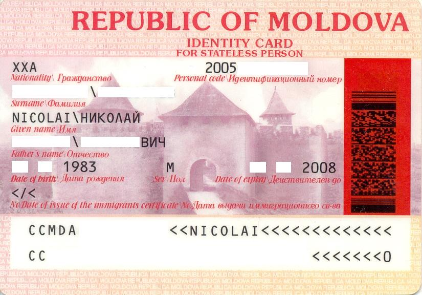 Оборотная сторона паспорта (пластиковая карточка) не гражданина Республики Молдова